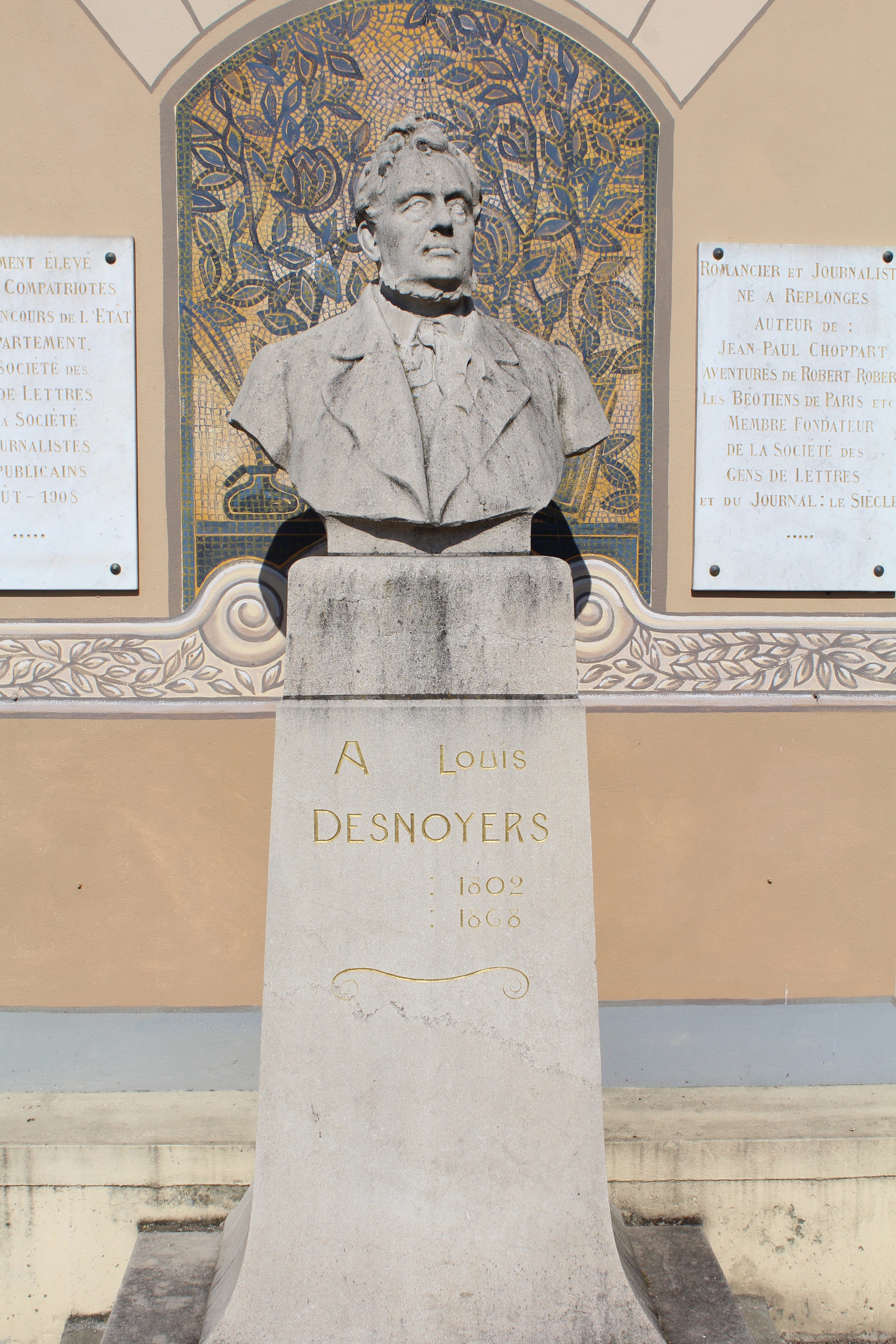 Buste de Desnoyers au hameau de La Madeleine à Replonges.